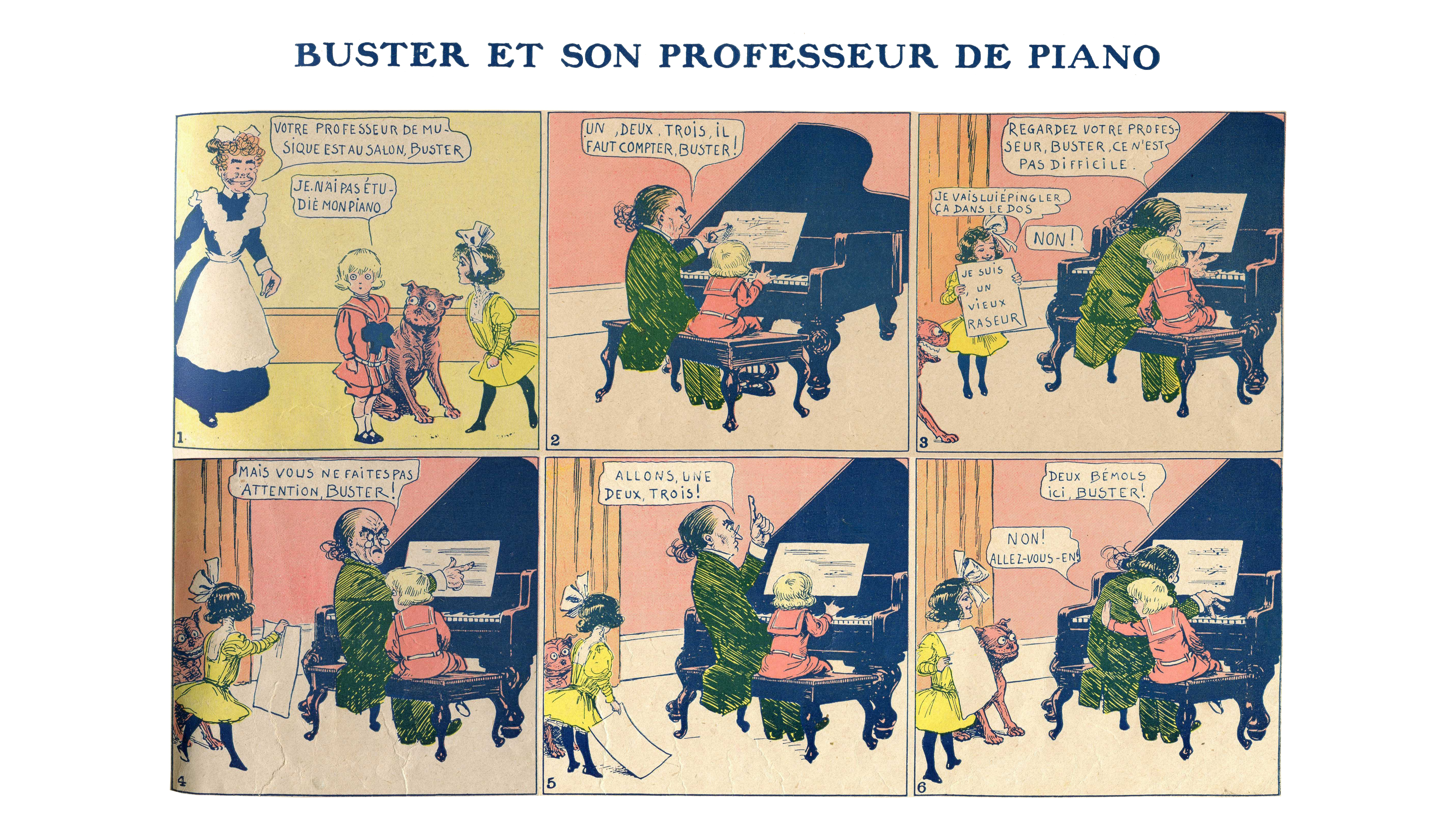 Buster et son professeur de piano